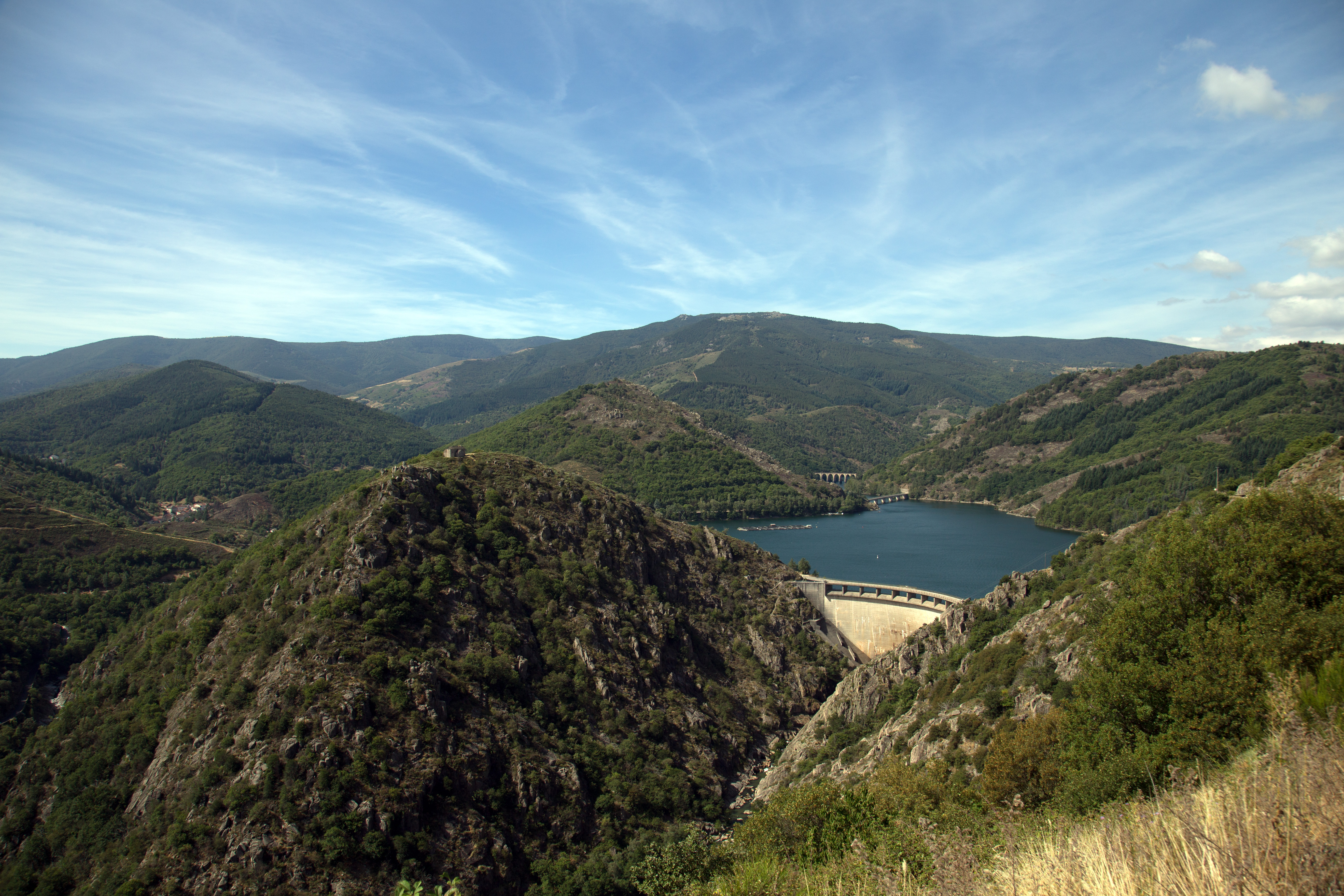 Staudamm von Villefort